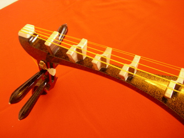 Japanese lute 琵琶